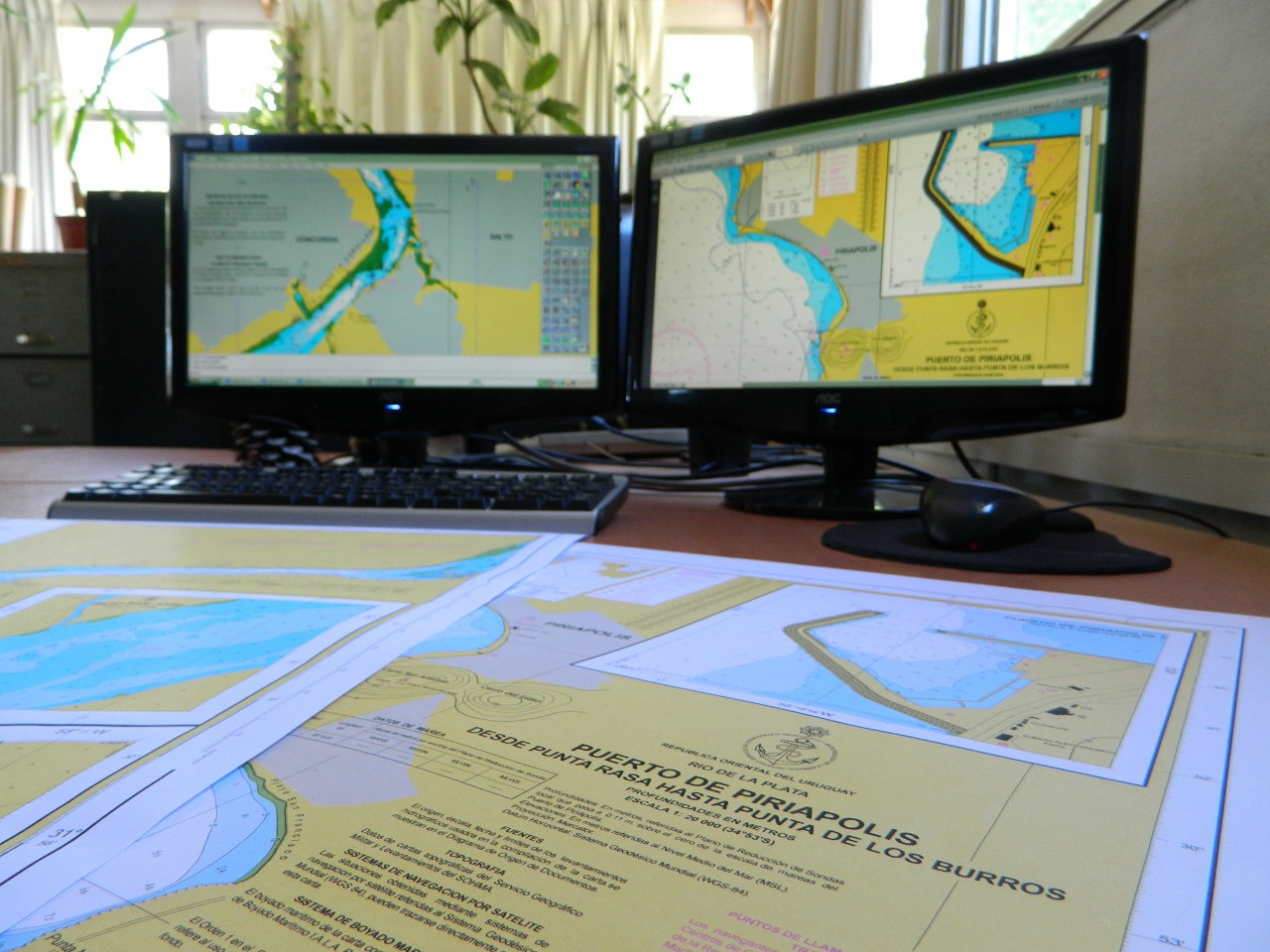 Cartografia SOHMA